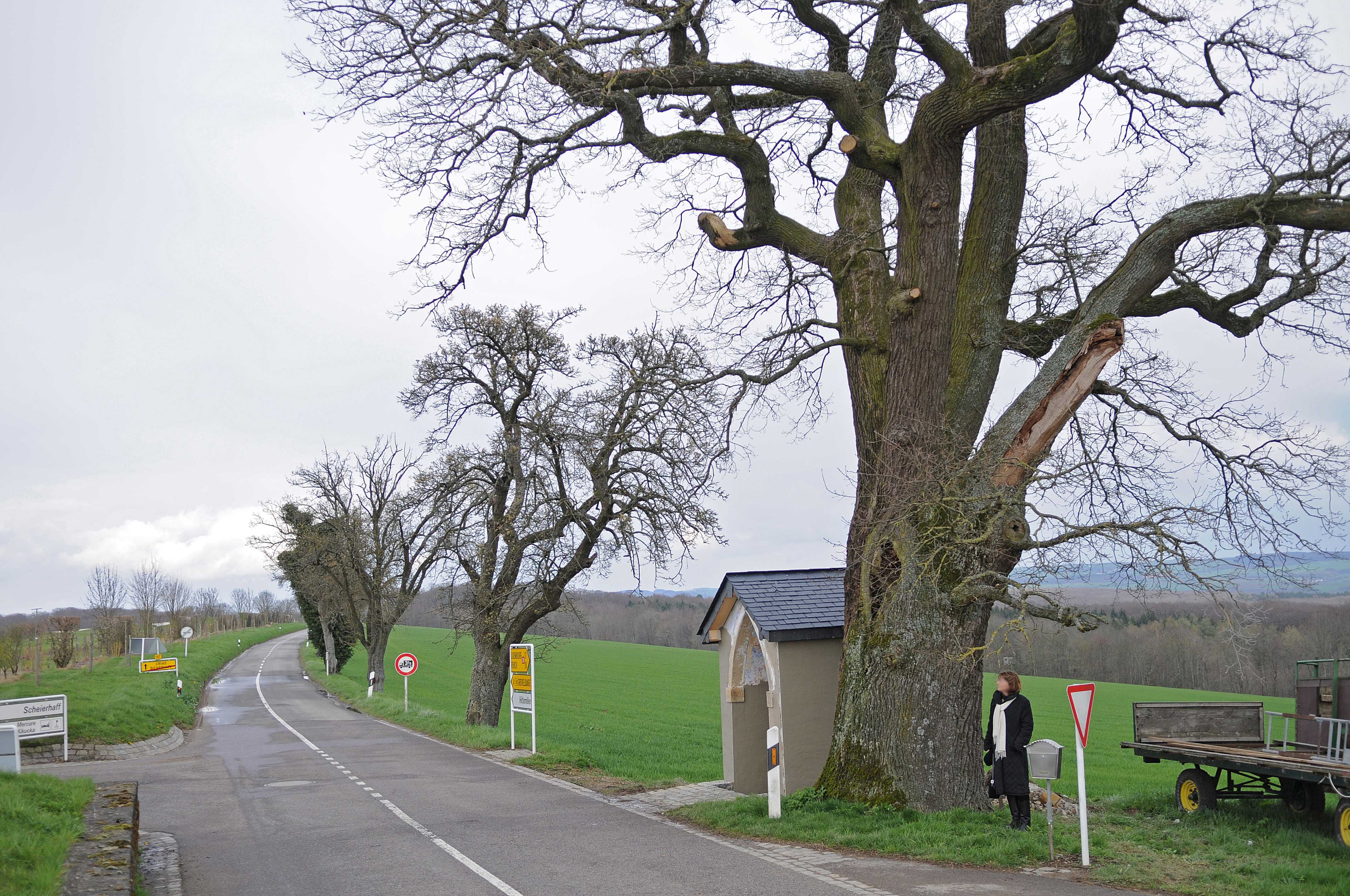 Eech um Bicherhaff.